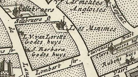 tussen de